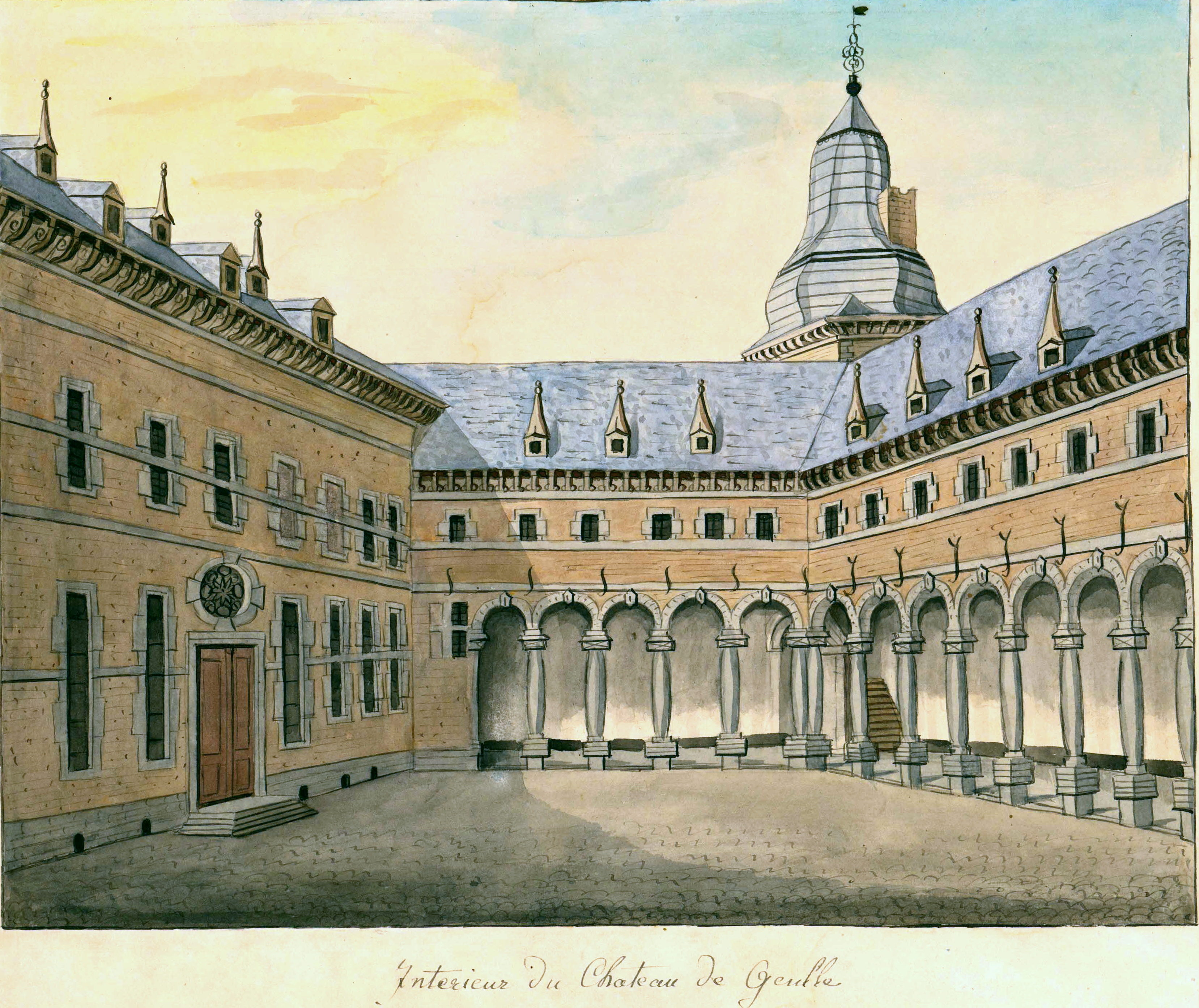 Ingekleurde tekening van Philippe van Gulpen van de hofzijde van Kasteel Geulle (Zuid-Limburg). Onderschrift: Interieur du Château de Geulle. Collectie Van der Noordaa in het RHCL, Maastricht, CVDN 286.